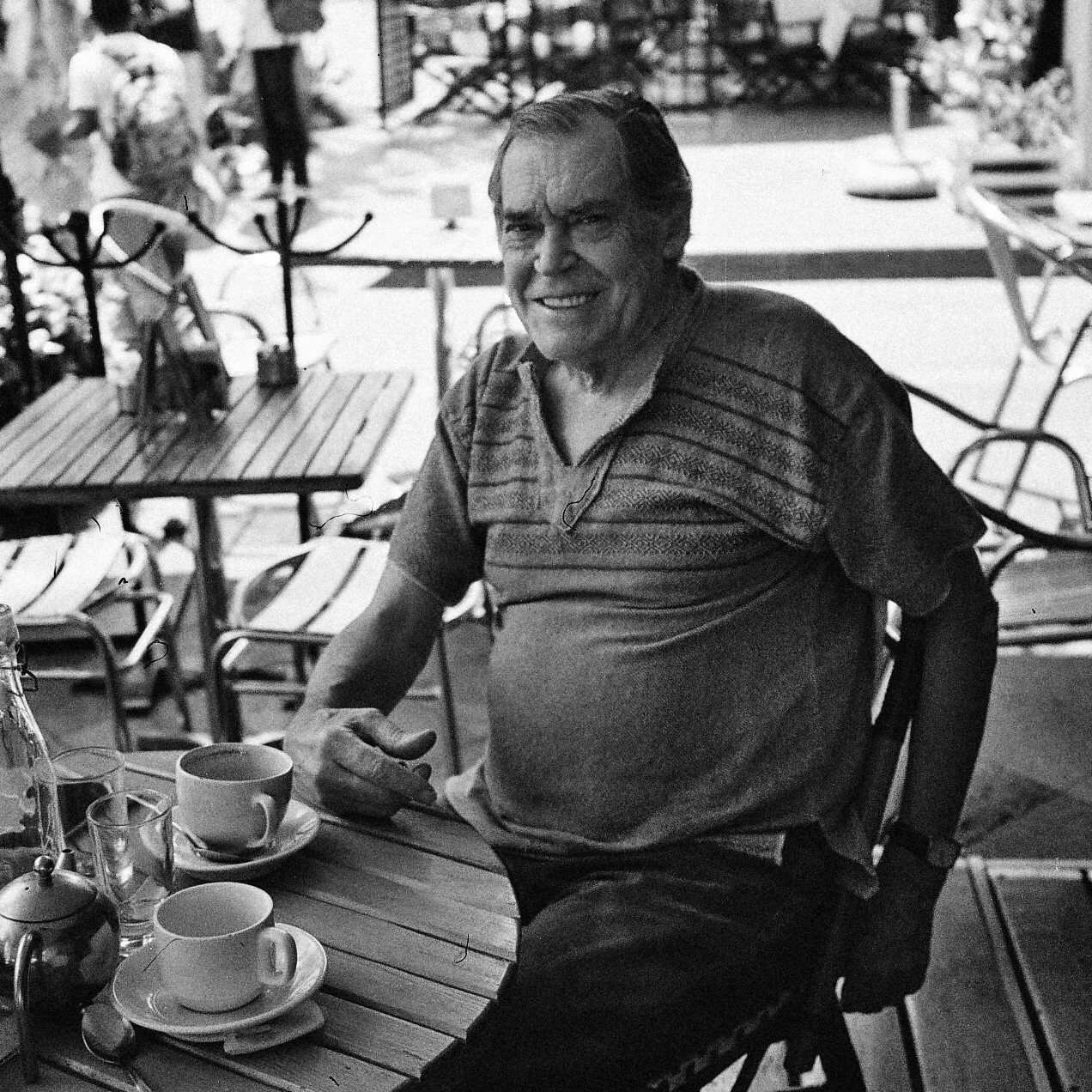 Francisco Rebolledo 2019. Fotografía de Alejandro Arras.